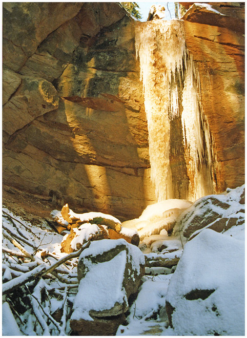 Zamrzlý Novopacký vodopád.